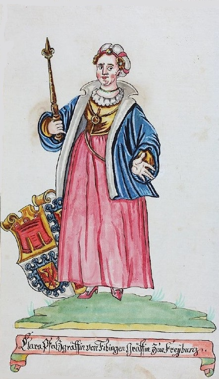 Clara Pfalzgräfin von Tübingen, geborene Gräfin von Freiburg